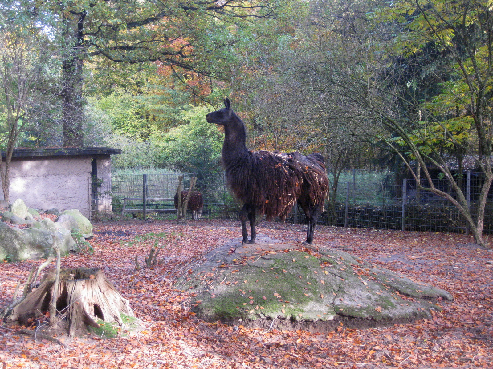 Guanako im Tierpark Lübeck am vorletzten Öffnungstag